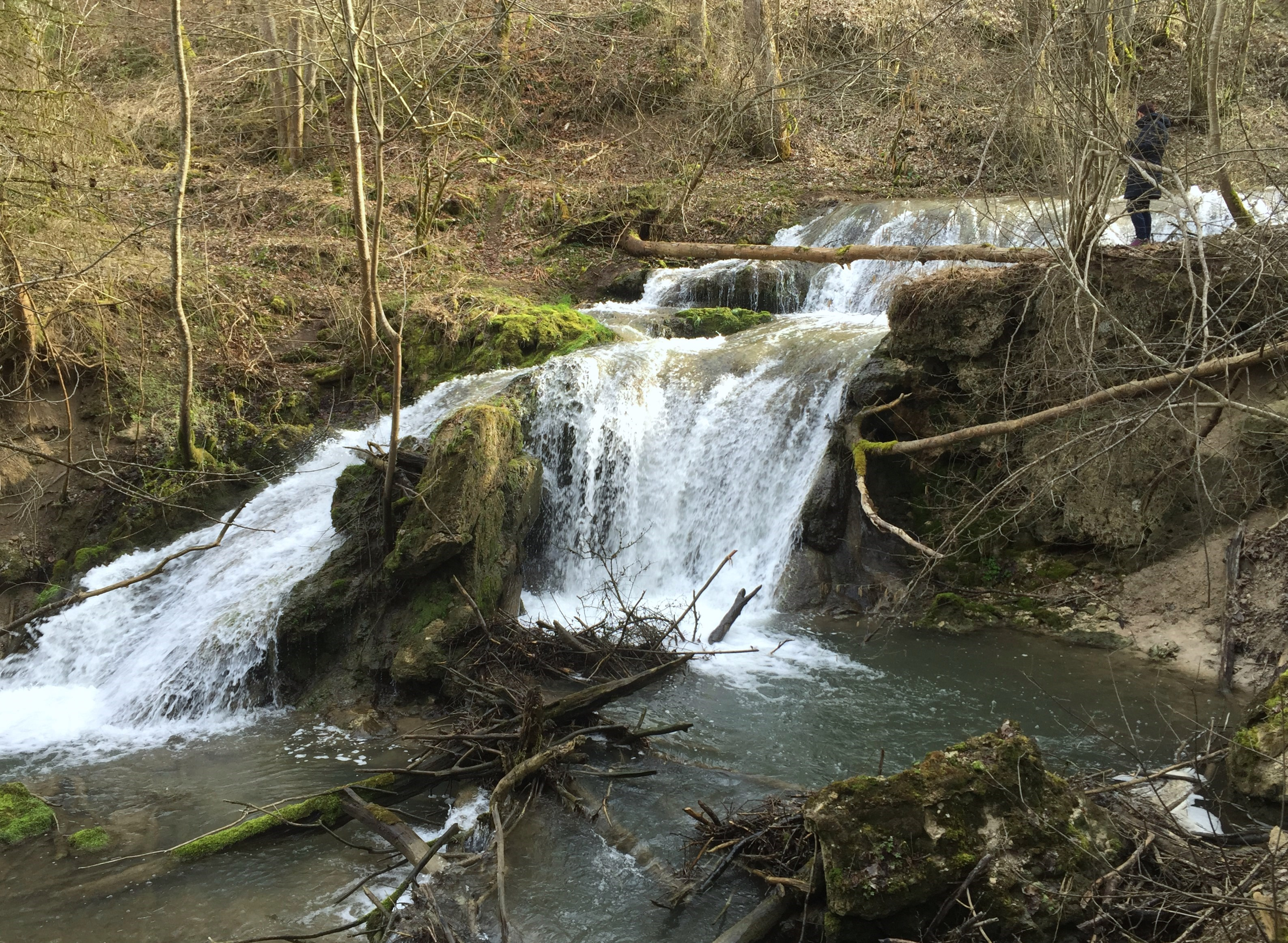 Für die Schwäbische Alb typischer konstruktiver Wasserfall durch Kalksinterausfällung, ähnlich dem Hohen Gießel einige Kilometer weiter flussaufwärts, allerdings durch Wasserableitung oft nahezu wasserlos